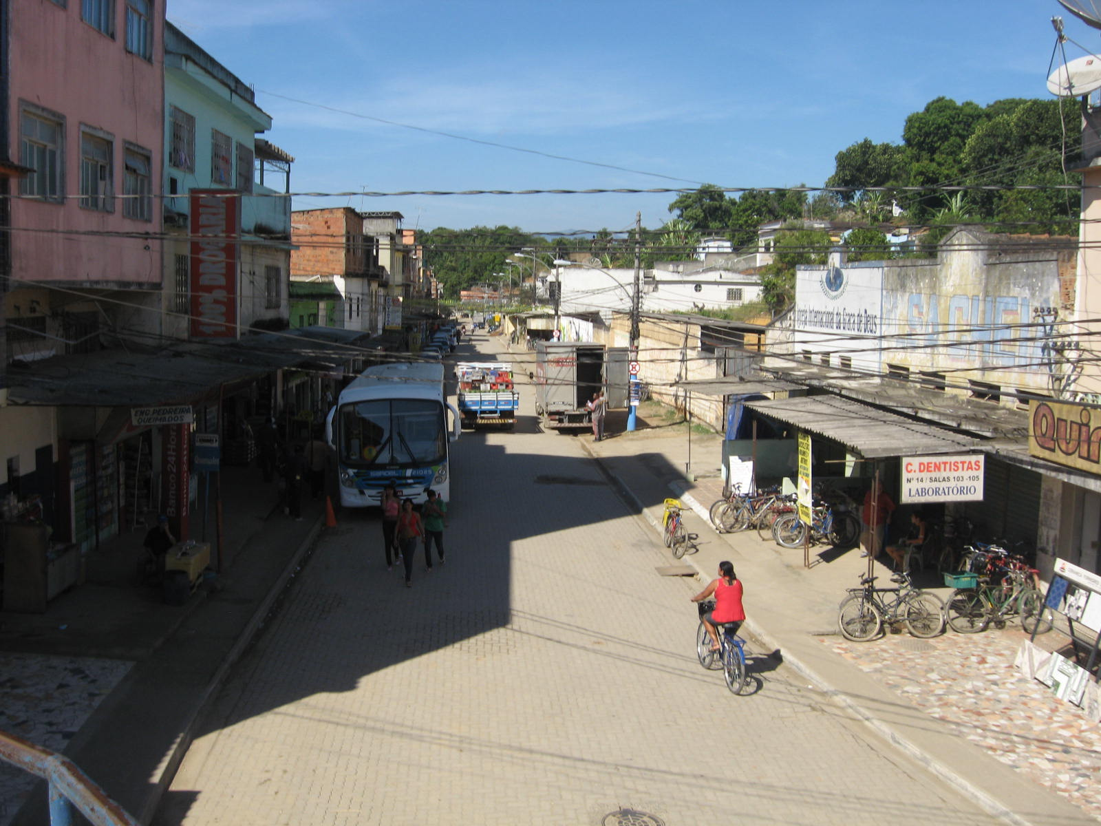 Vista de Engenheiro Pedreira, em Japeri, RJ.